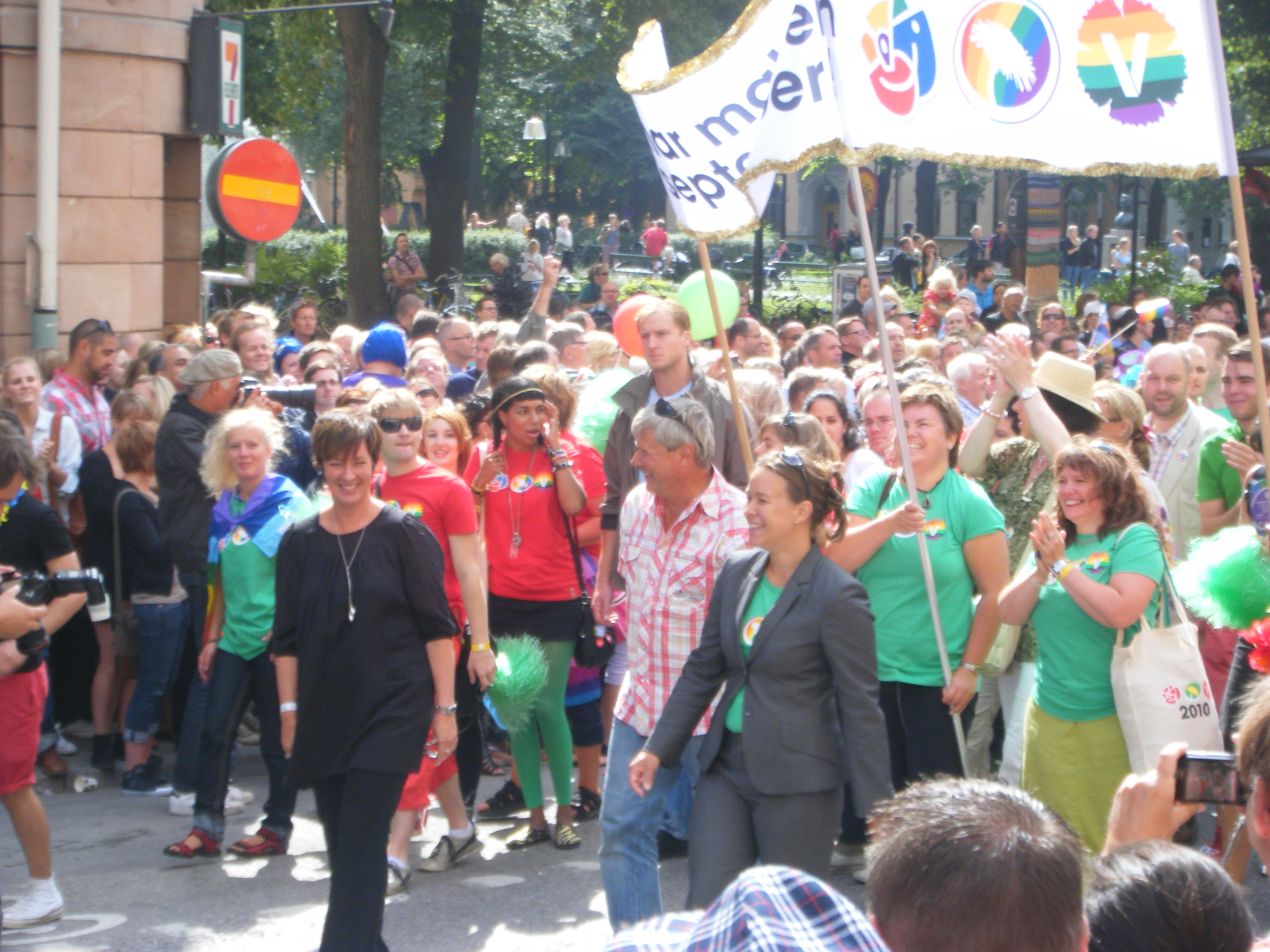 Stockholm Pride 2010 at Hornsgatan